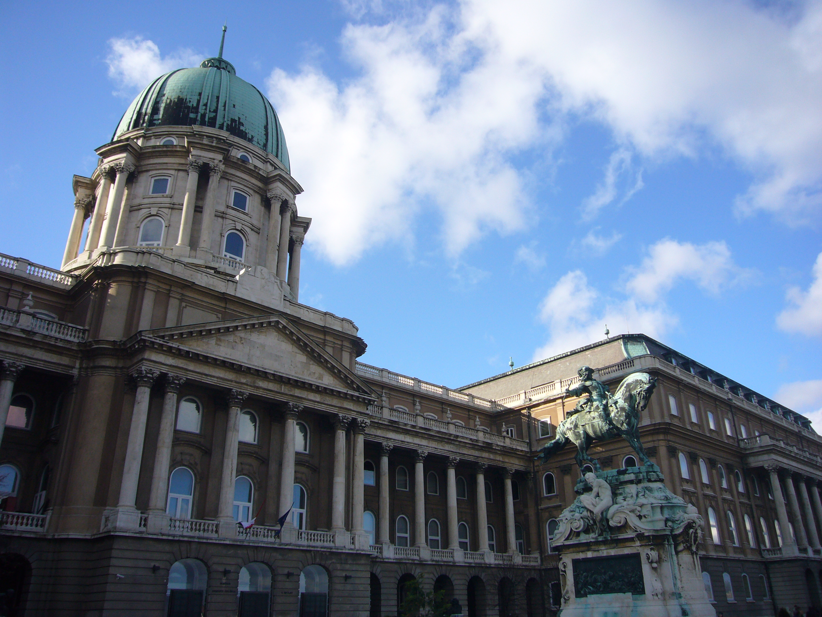 Buda Castle